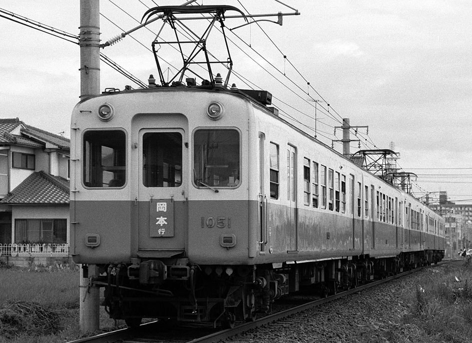 高松琴平電鉄 1051+1052+1063+1020形×2